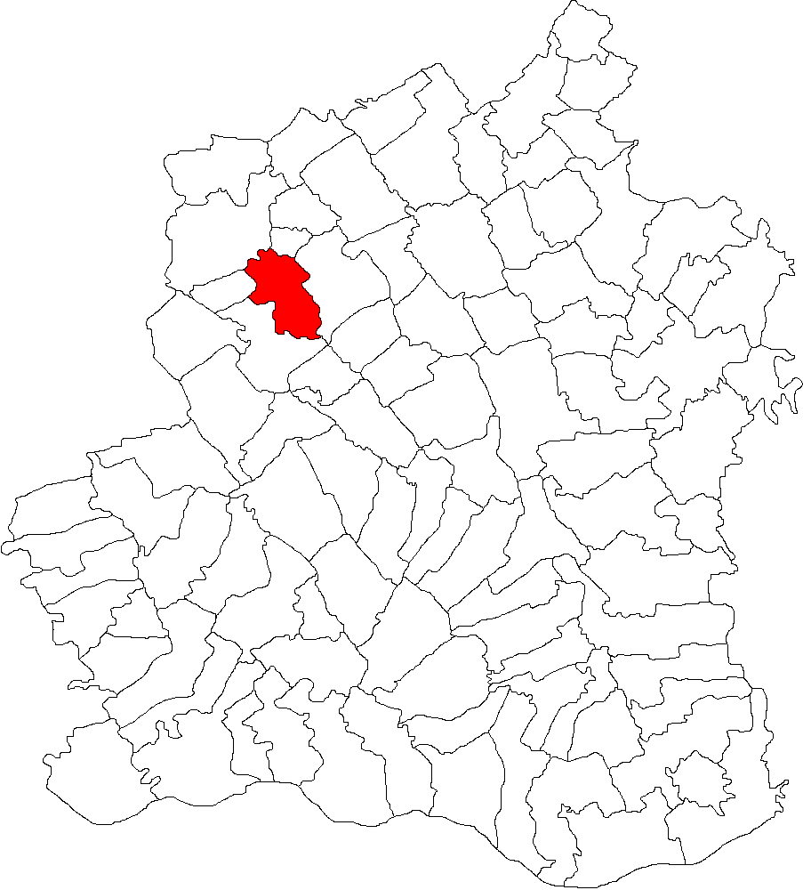 Categorie:Hărţi ale judeţului Teleorman